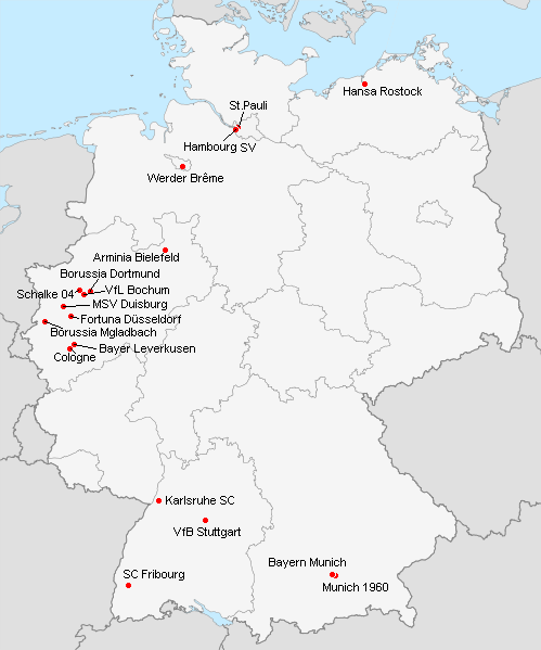 Répartition des clubs en 1.Bundesliga 1996-1997.